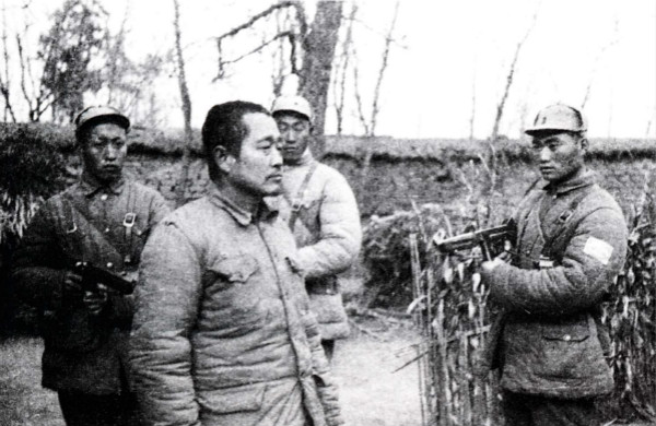 捕虜となった杜聿明